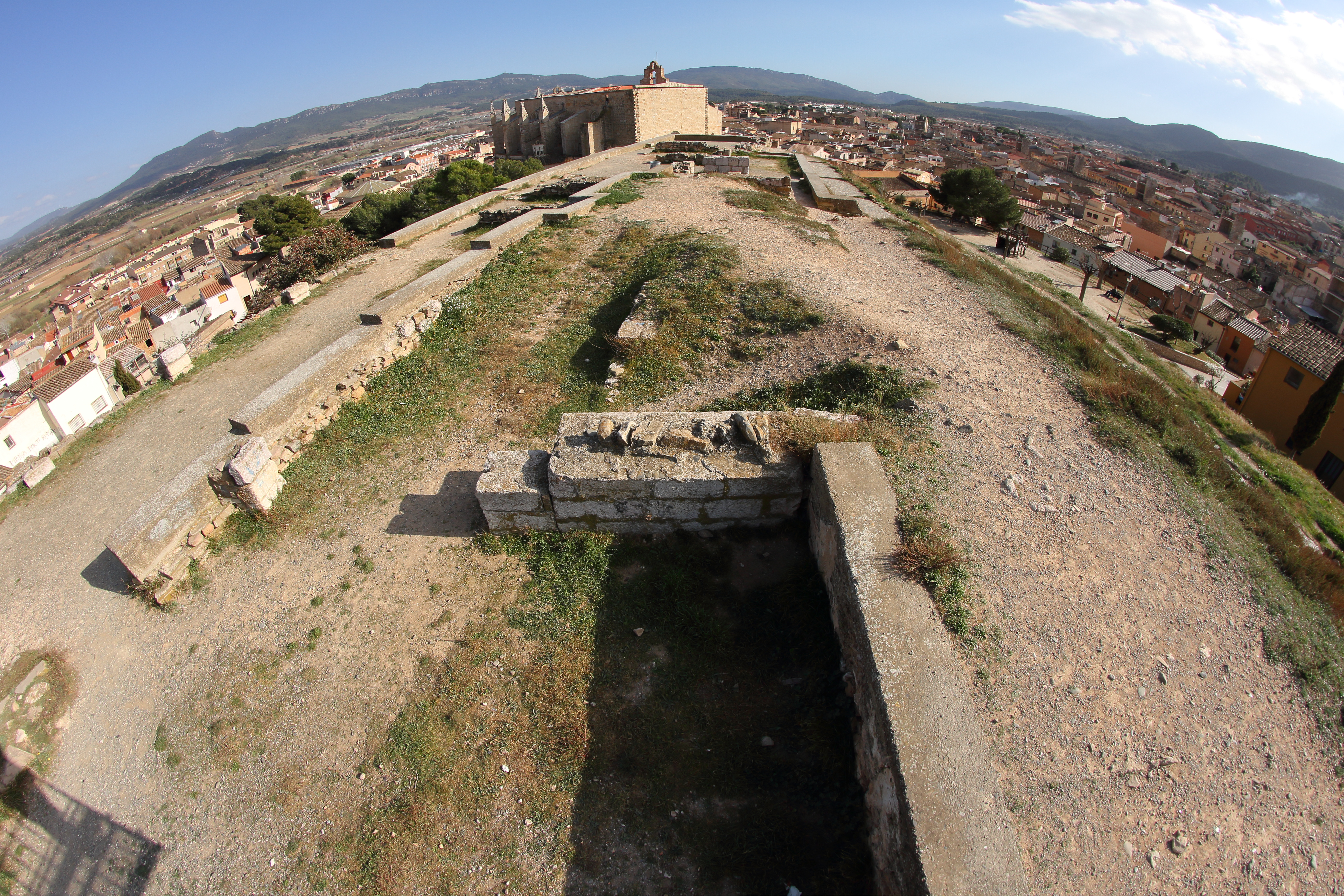 Pla de Santa Bárbara, 03